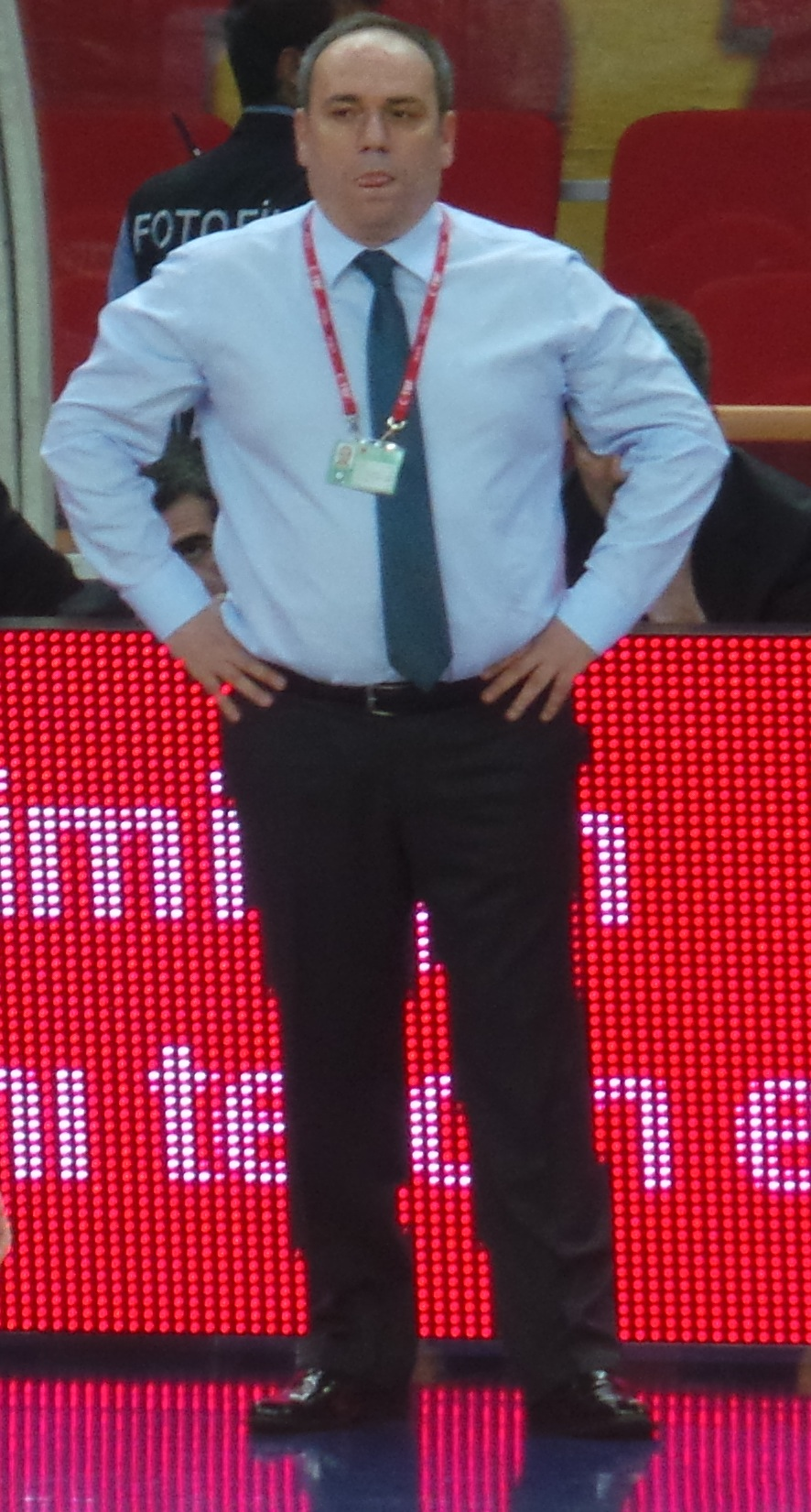 Ahmet Kandemir